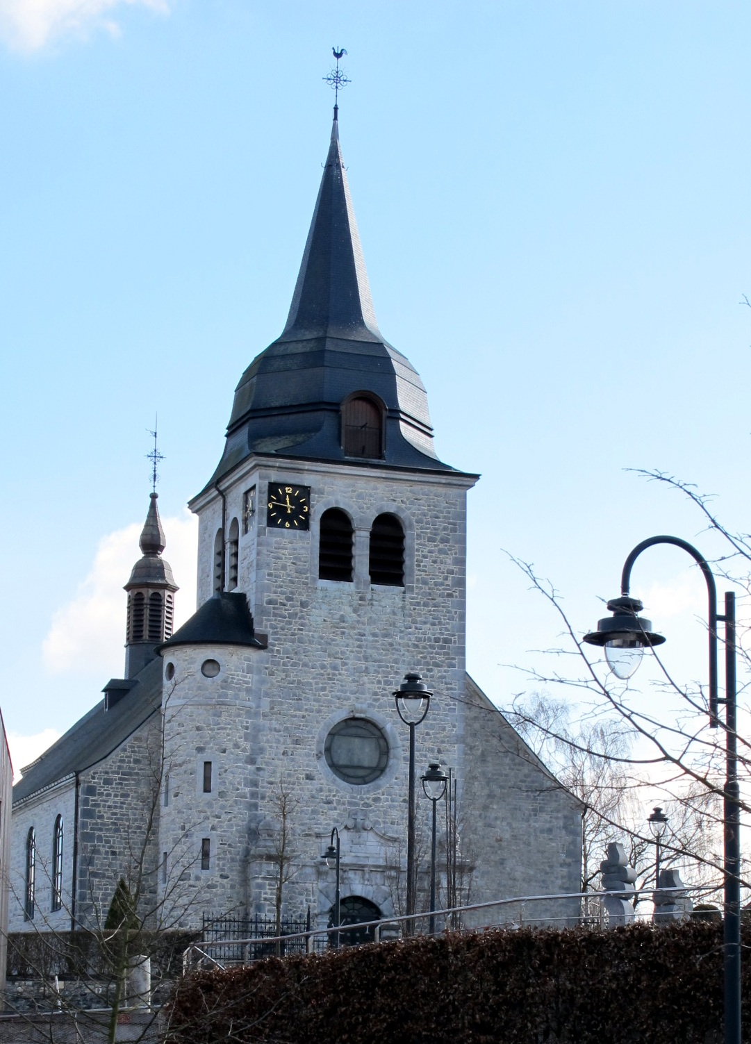 St. Hubertuskirche Lontzen, erbaut 1770 nach Plänen von Joseph Moretti, Turm von 1910